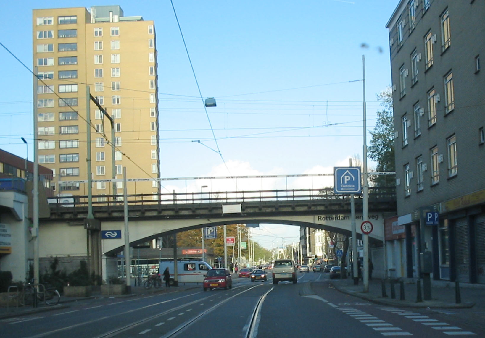 station Rotterdam Bergweg, 13 november 2005